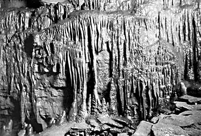 Höhlenformation in "Violet City", Mammoth Cave National Park, Edmondson County, Kentucky View of Park Geologic Feature, 1925 Photographer: T. W. Lee Description: Cave formation in "Violet City"., Mammoth Cave National Park. Edmondson County, Kentucky. May 13, 1925. Contents 1 Summary 2 Status 3 Licensing 4 Original upload log Summary Status Public Domain